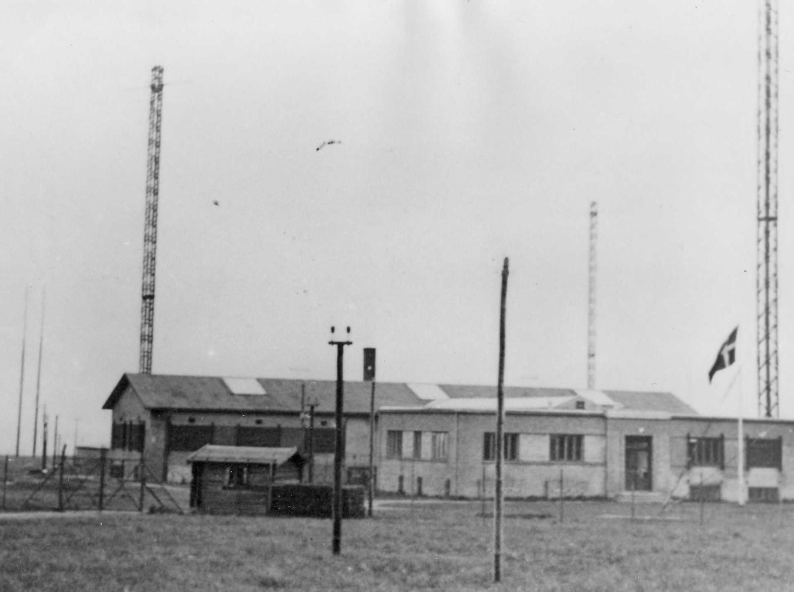 Besættelsen,1